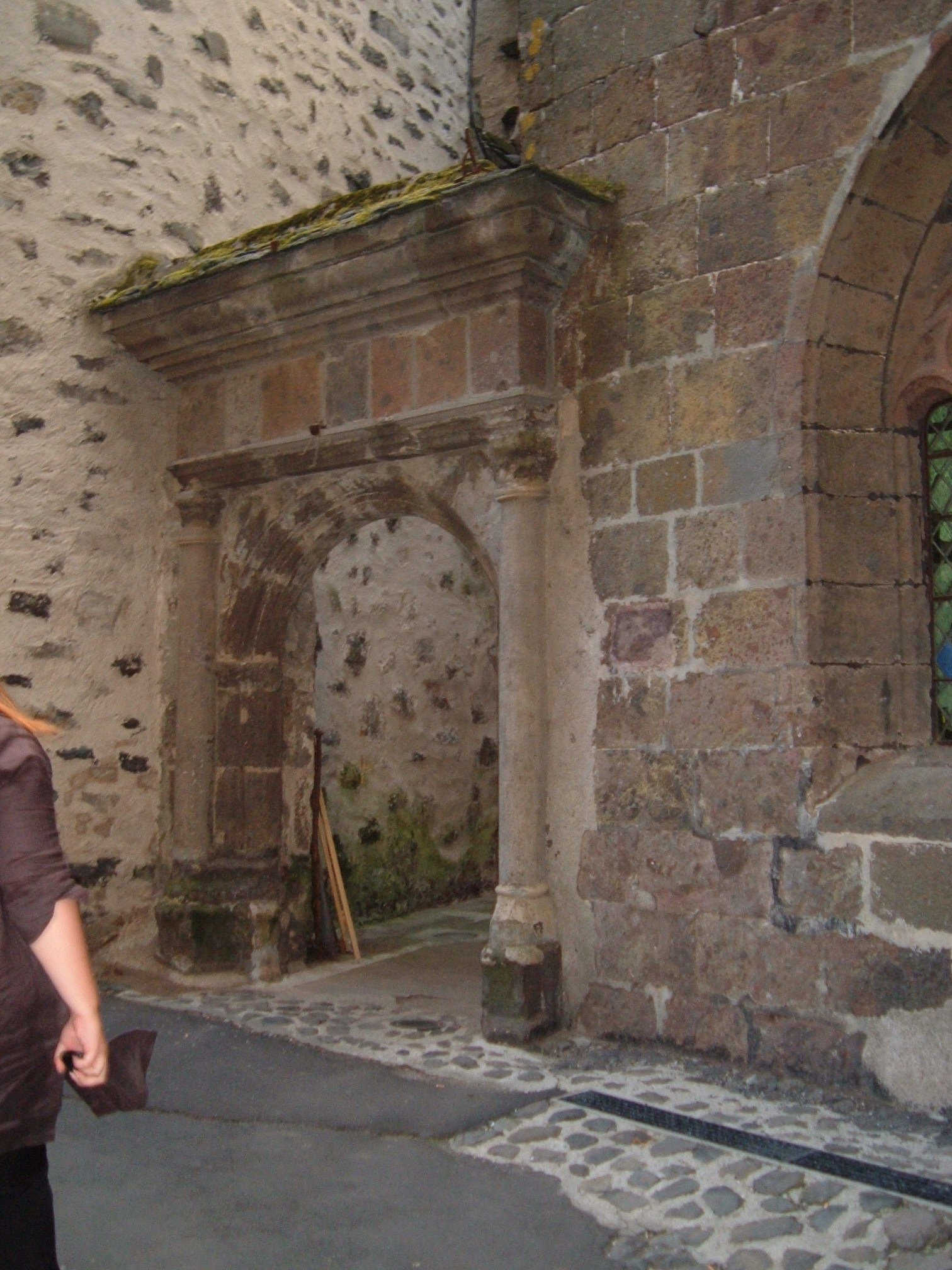 Il s'agit ici de l'ancien hôtel de la famille de Pierre Lizet, qui fonda le premier hospice de la cité de Salers